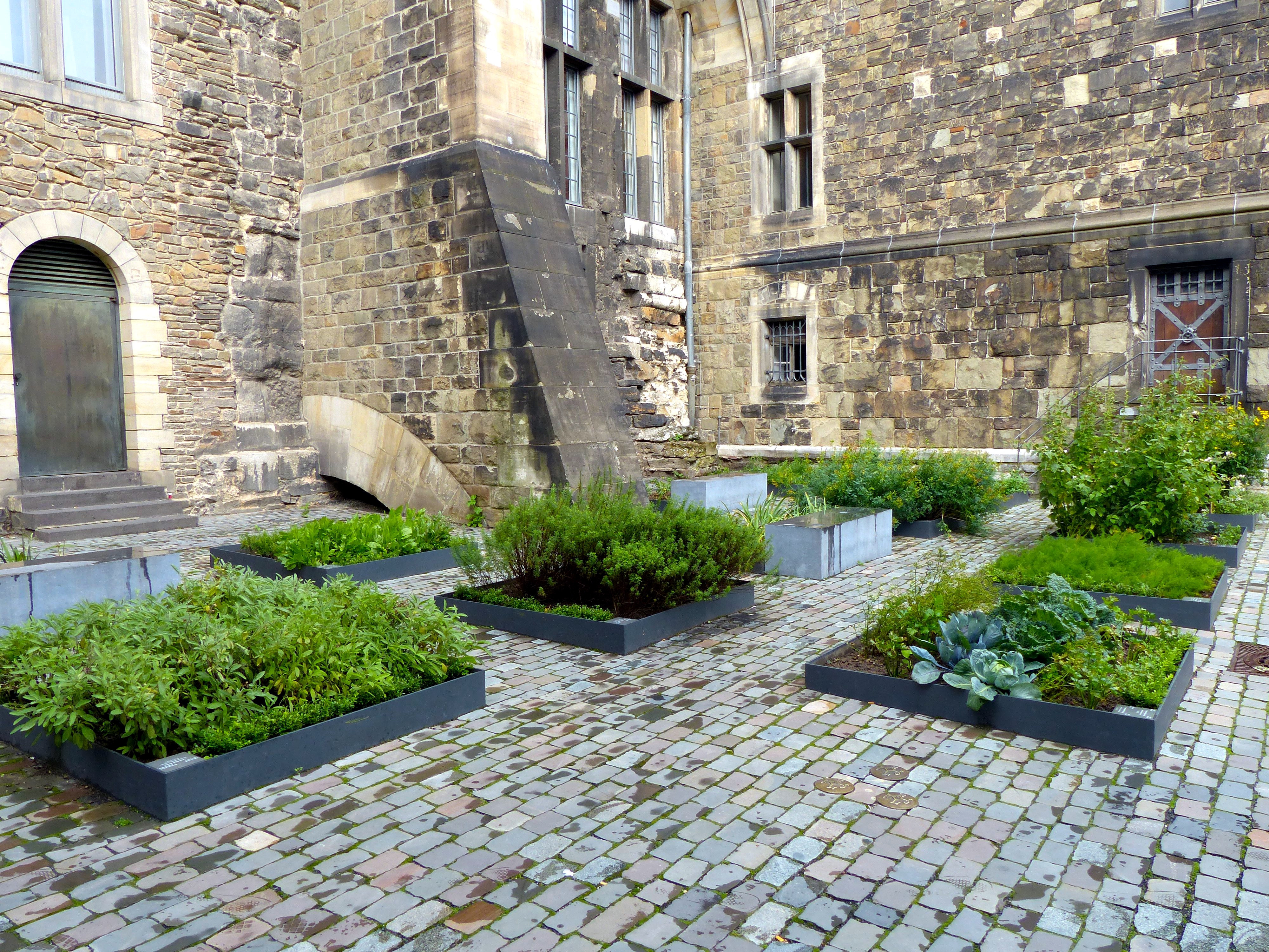 Neuangelegter Karlsgarten auf der Rückseite des Aachener Rathauses